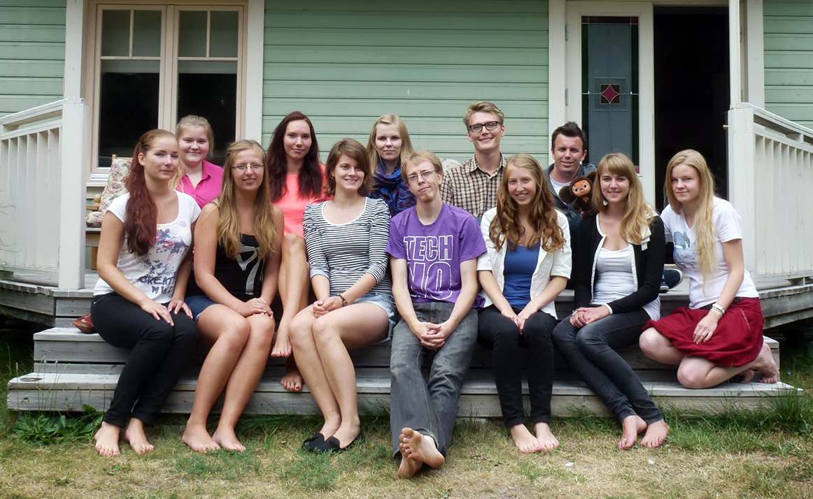 Eesti Psühholoogiaüliõpilaste Üheduse juhatused. Tagumine rida: Kätlin Kallas (Abipea 12/13), Mari Naudi (Teopea 13/14), Liis Lemsalu (Europea 12/13), Taavi Kivisik (Pea 13/14), Hardi Sigus (Rahapea 12/13); Eesmine rida: Mari Ader (Sulepea 13/14), Halliki Aasmäe (Sulepea 12/13), Agne Põlder (Europea 13/14), Madis Vasser (Nõupea 13/14), Maigi Proosa (Abipea 13/14), Kadri Raag (Rahapea 13/14) ja Katrin Linask (Nõupea 12/13).